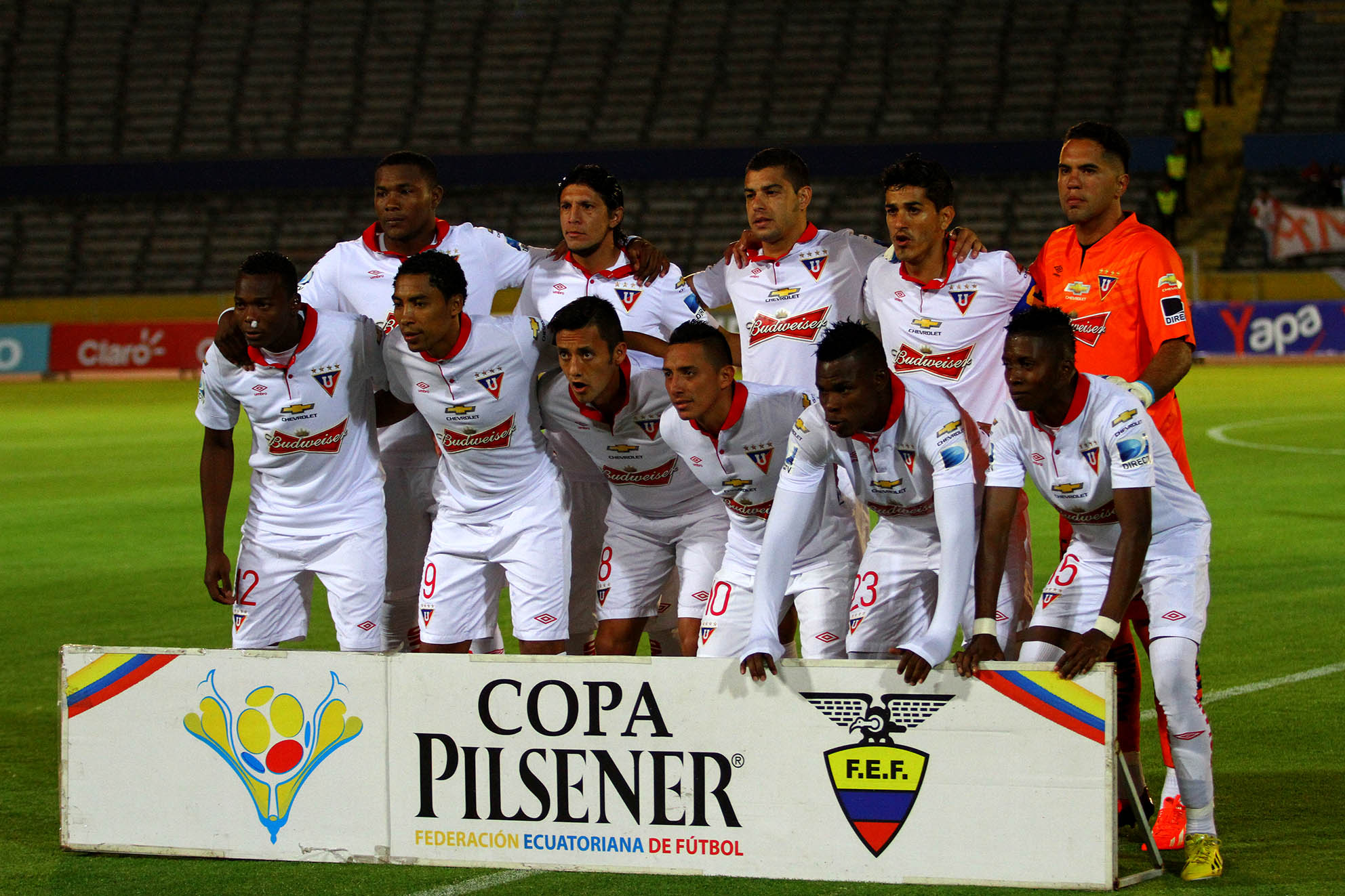 Quito, 13 de agosto de 2014 (Andes).- La Universidad Católica (celeste) se enfrentó en el estadio Olímpico Atahualpa a la Liga de Quito.